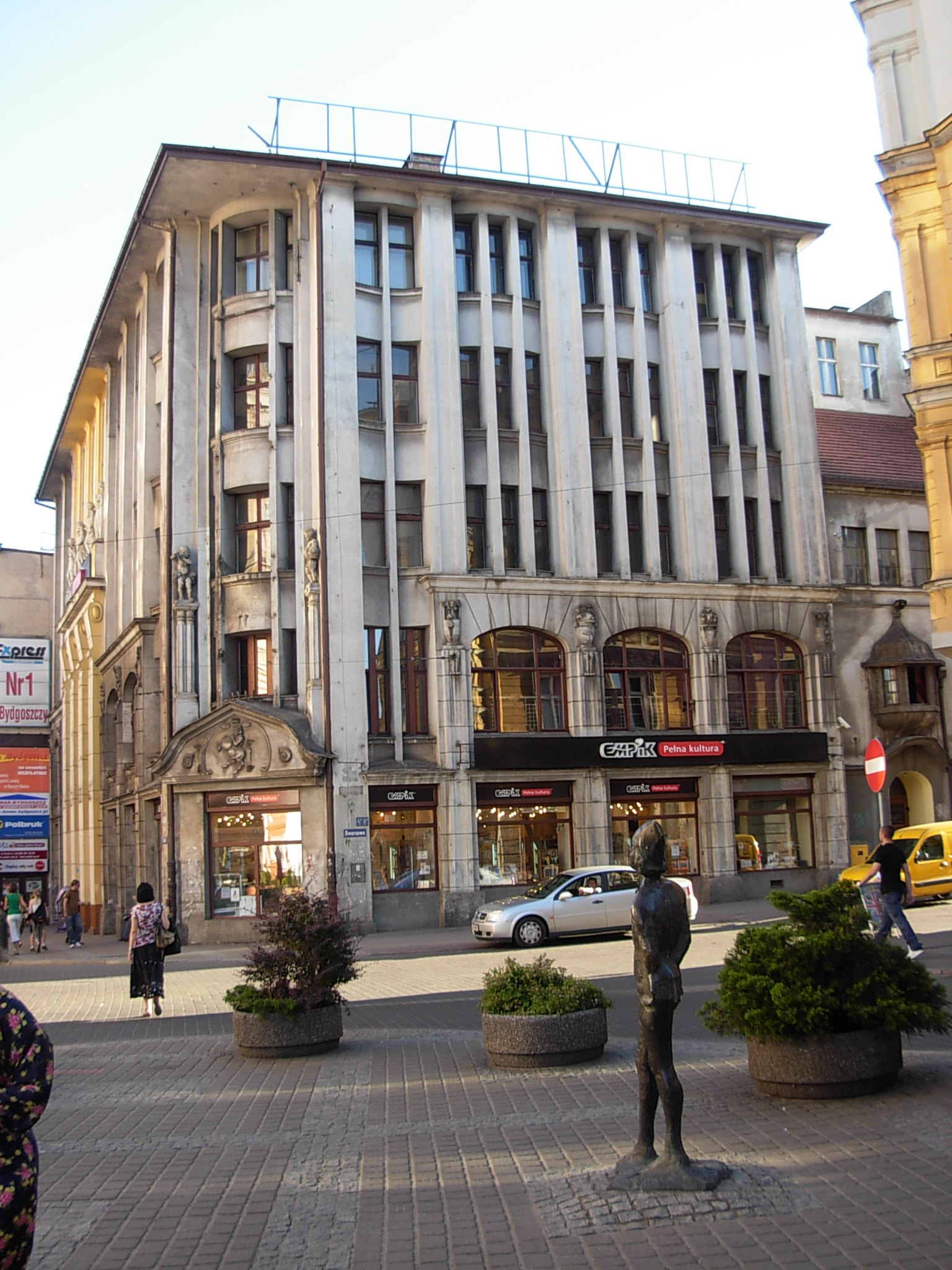 Kamienica modernistyczna DH Jedynak ul. Gdańska 15 w Bydgoszczy